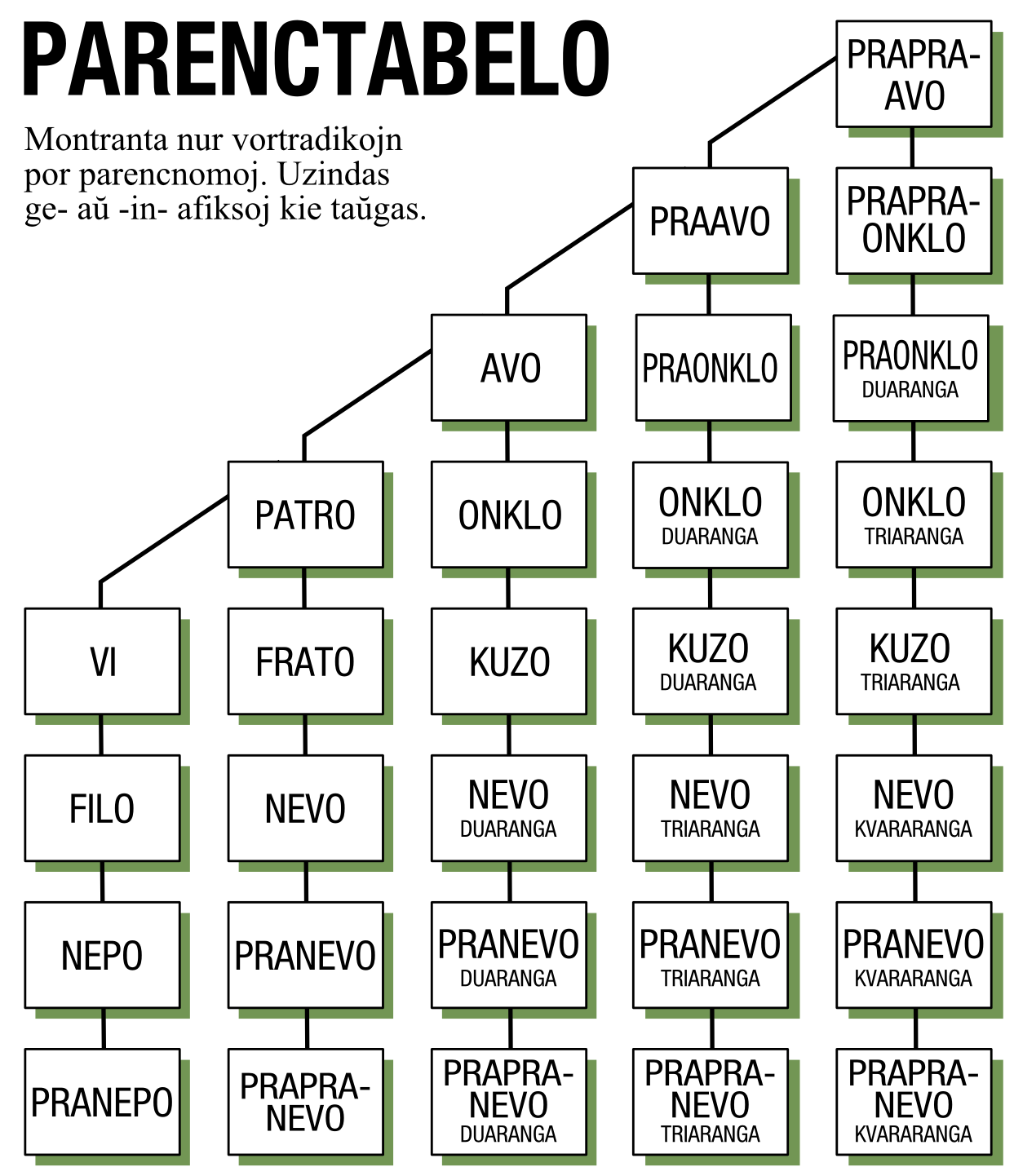 Esperantlingva tabelo por helpi komprenigi pri diversaj parencnomoj rilate al la vidanto